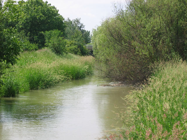 Der Rußbach bei Parbasdorf: Lizenz: GNU FDL Quelle: Foto plp Datum: de:2004 Ort: Parbasdorf, Niederösterreich